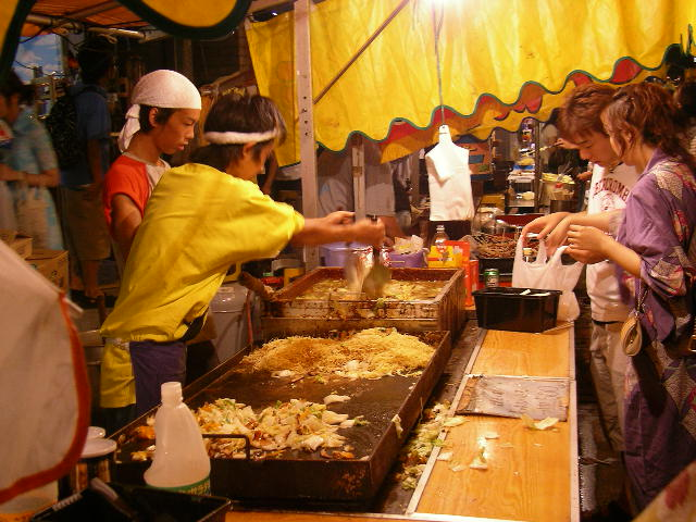 Yakisoba yatai (Fried noodle stall) @ Azabu-Jūban Nōryō Matsuri